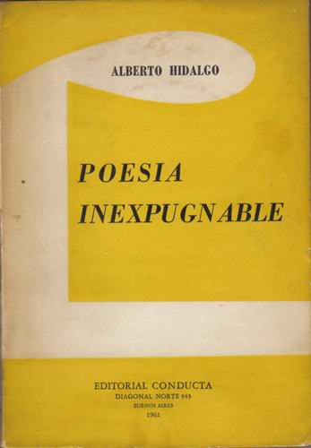 Carátula de libro "Poesía inexpugnable" de Alberto Hidalgo